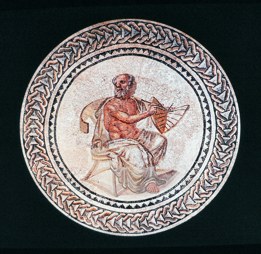 Représentation partielle d'une mosaïque de Trèves, Musée rhénan de Trèves